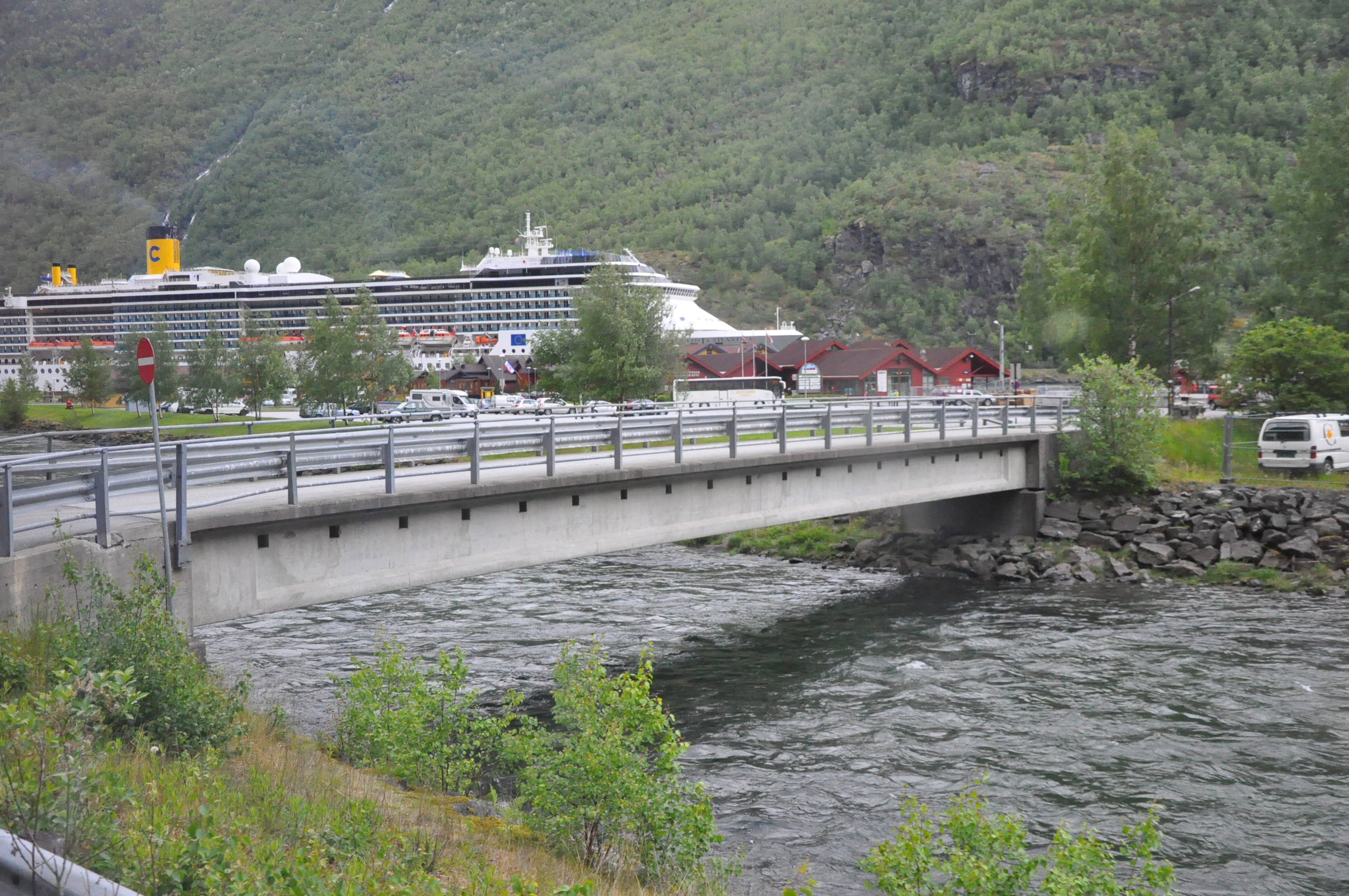 Nedre Brekke bru over Flåmselvi. Del av Fylkesveg 245 i Sogn og Fjordane